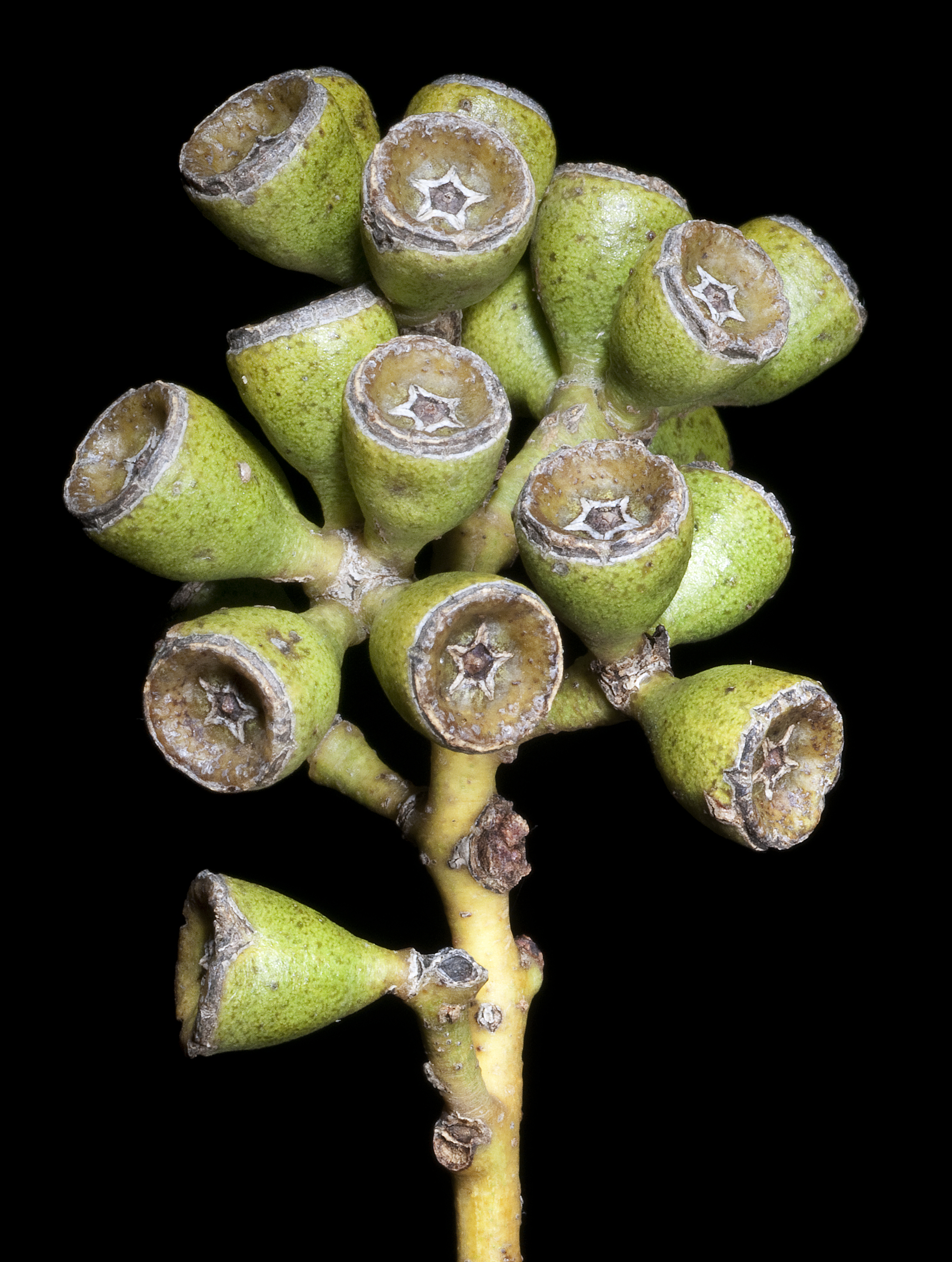 KRT4157